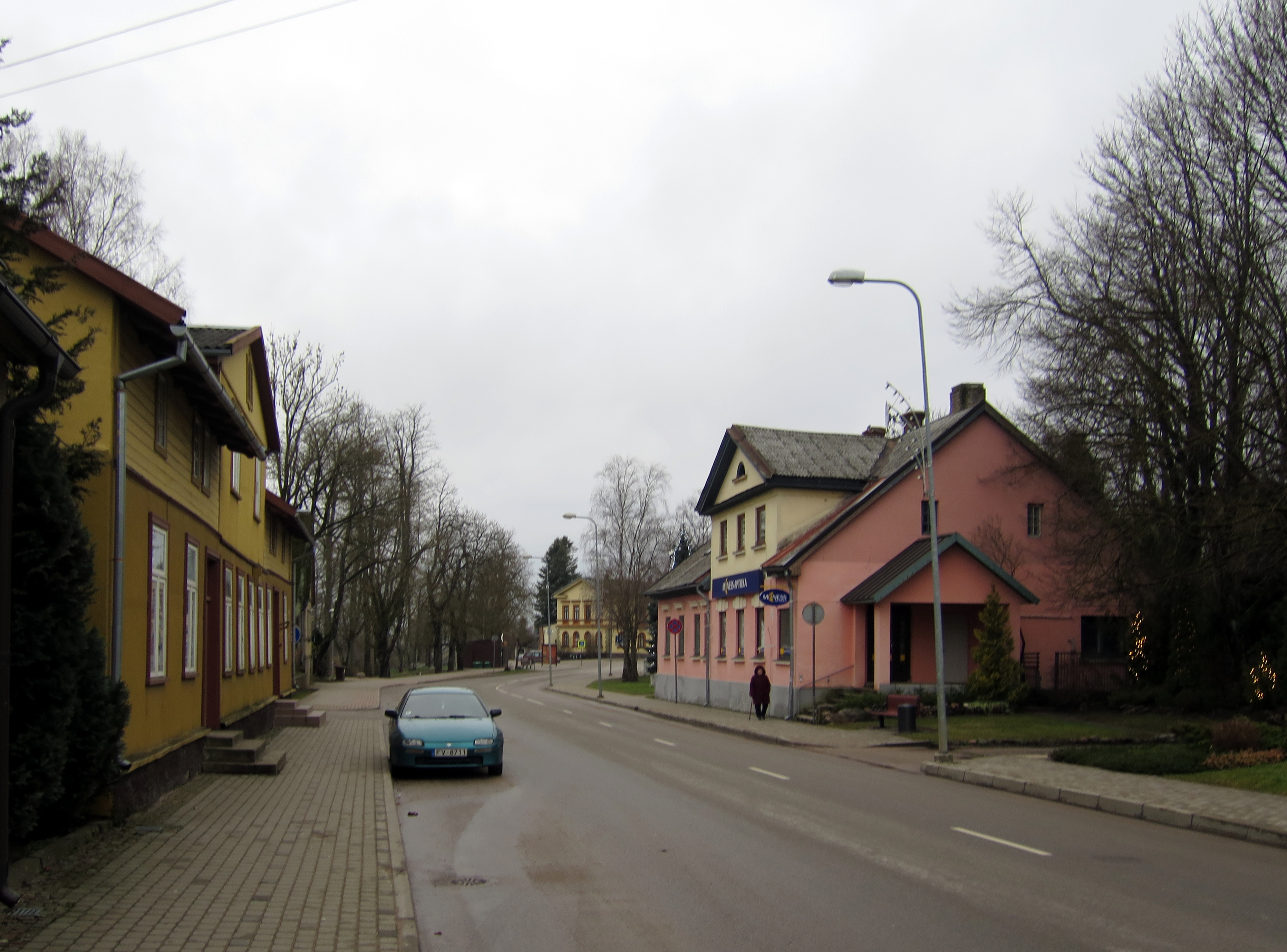 Lielā iela Grobiņā